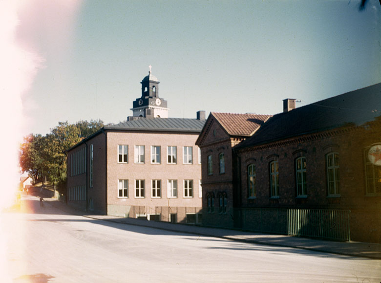 Gata i Åmål Motiv: Åmål Nyckelord: Riksintressen Kategori: Stadsmiljö, (01) Exteriörer Gata i Åmål.